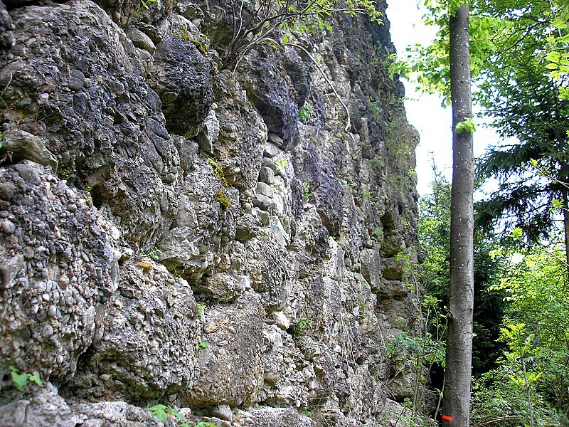 Burg Rauhlaubenberg bei Immenstadt im Allgäu (Landkreis Oberallgäu, Bayerisch-Schwaben). Die Westseite des Wohnturmes. Eigene Aufnahme, Mai 2008 / Rauhlaubenberg castle near Immenstadt im Allgäu (Landkreis Oberallgäu, Bavaria, Germany). Western facade of the keep. Own photo, May 2008